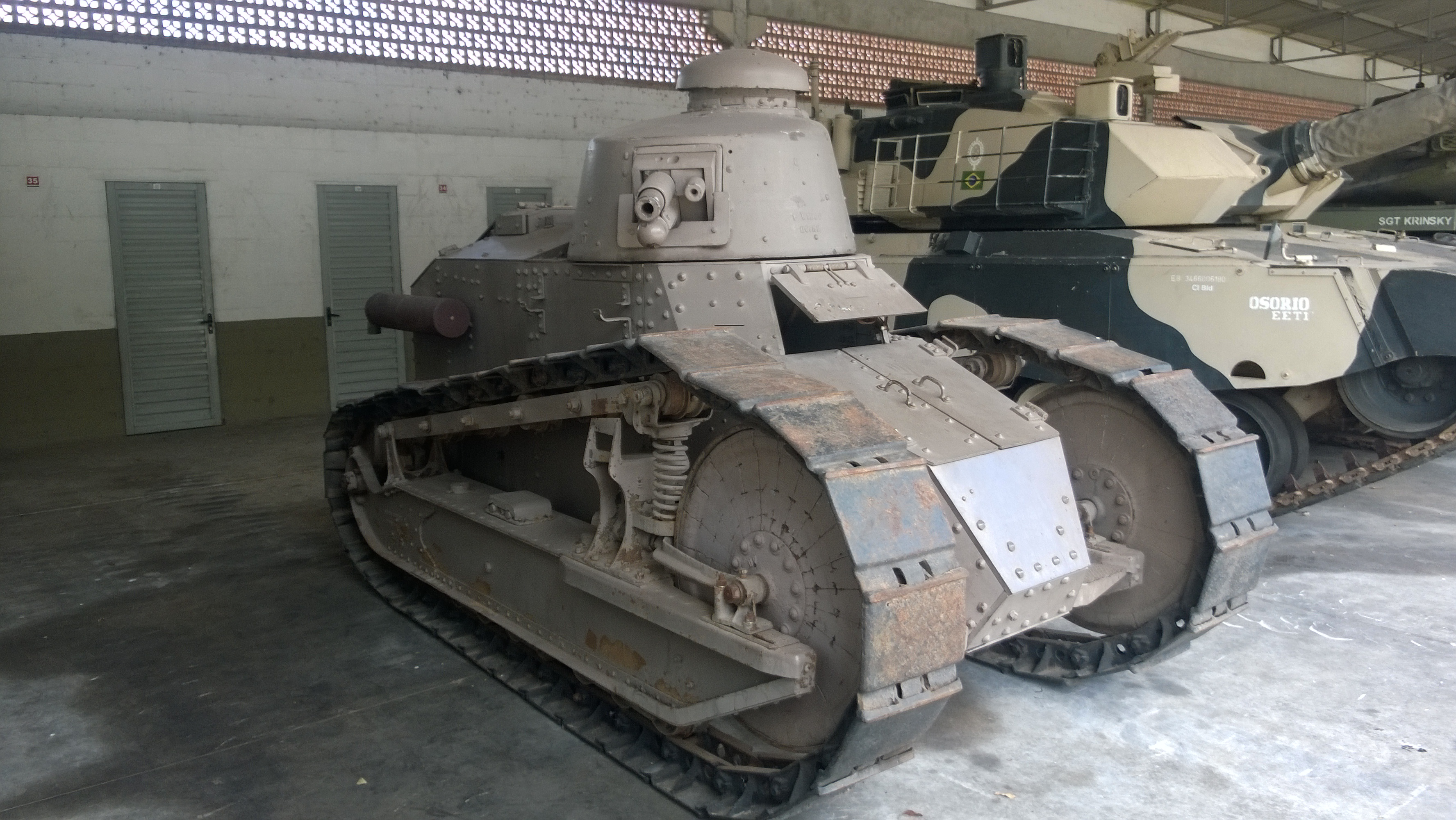 Tanque FT-17 estacionado no pátio de manutenção do Centro de Instrução de Blindados (Santa Maria-RS).